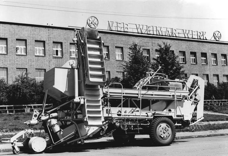 Weimar, VEB Weimar-Werk, Mähdrescher Zentralbild Demme 6.8.68 Erfurt: Spitzenerzeugnis des Landmaschinenbaubetriebes VEB Weimar-Werk in Weimar ist der Kartoffelsammelroder E665, Hauptglied der Maschinensystemde zur industriemäßigen Produktion von Kartoffeln. Für dieses Erzeugnis erhielt das Werk 1968 auf der Leipziger Messe eine Goldmedaille und ein Diplom mit Goldmedaille auf der "agra 68". Mehr als 3 500 Werktätige des Weimar-Werkes haben in den zurückliegenden Wochen die Planziele für die nächsten beiden Jahe diskutiert. Die Planaufgaben für das nächste Jahr, die zur Diskussion standen, wurden mit über 600 Vorschlägen der Landmaschinenbauer bereichert - Vorschlägen vor allem zur Senkung der Kosten durch Einsparungen von Hilfs- und Grundmaterial und zur raschen Steigerung der Arbeitsproduktivität.